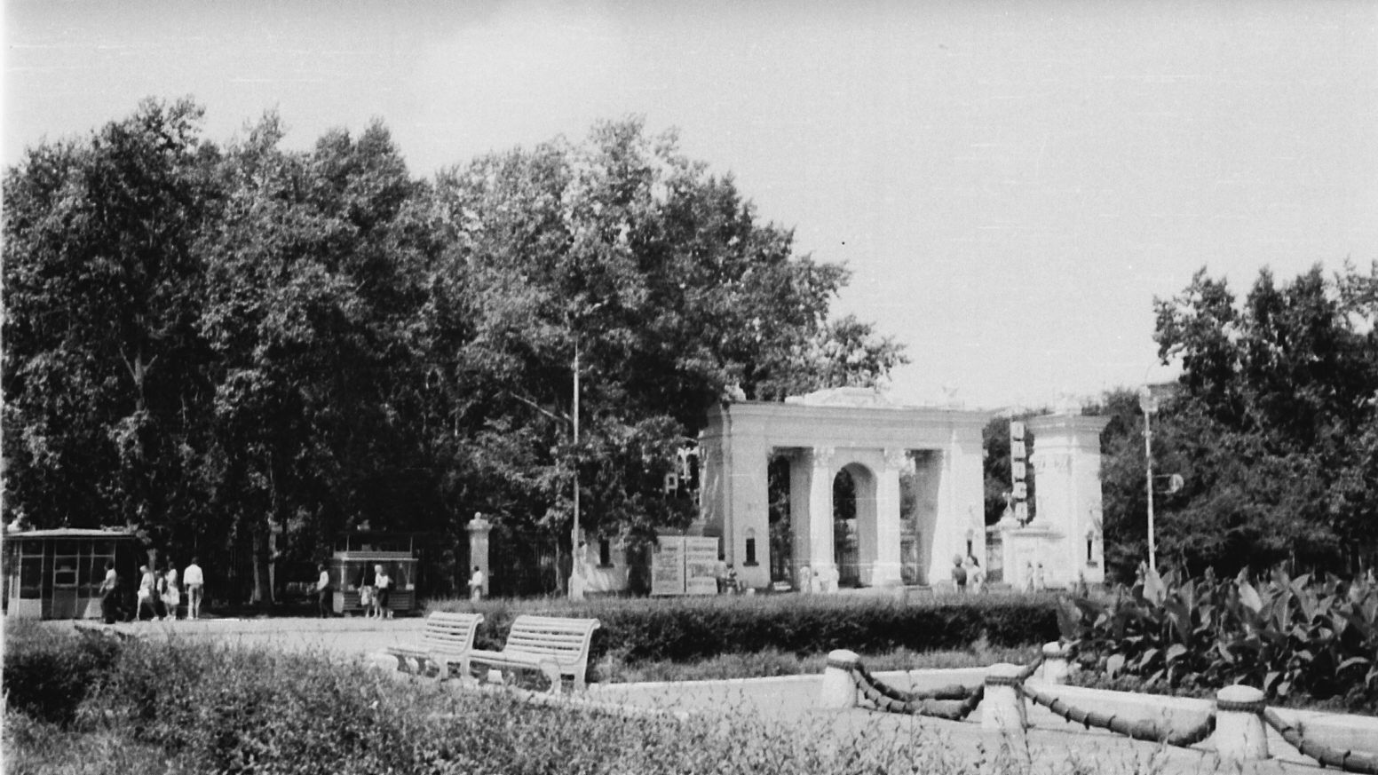 Хабаровск, вход в парк Окружного дома офицеров Советской армии (ОДОСА), лето 1977